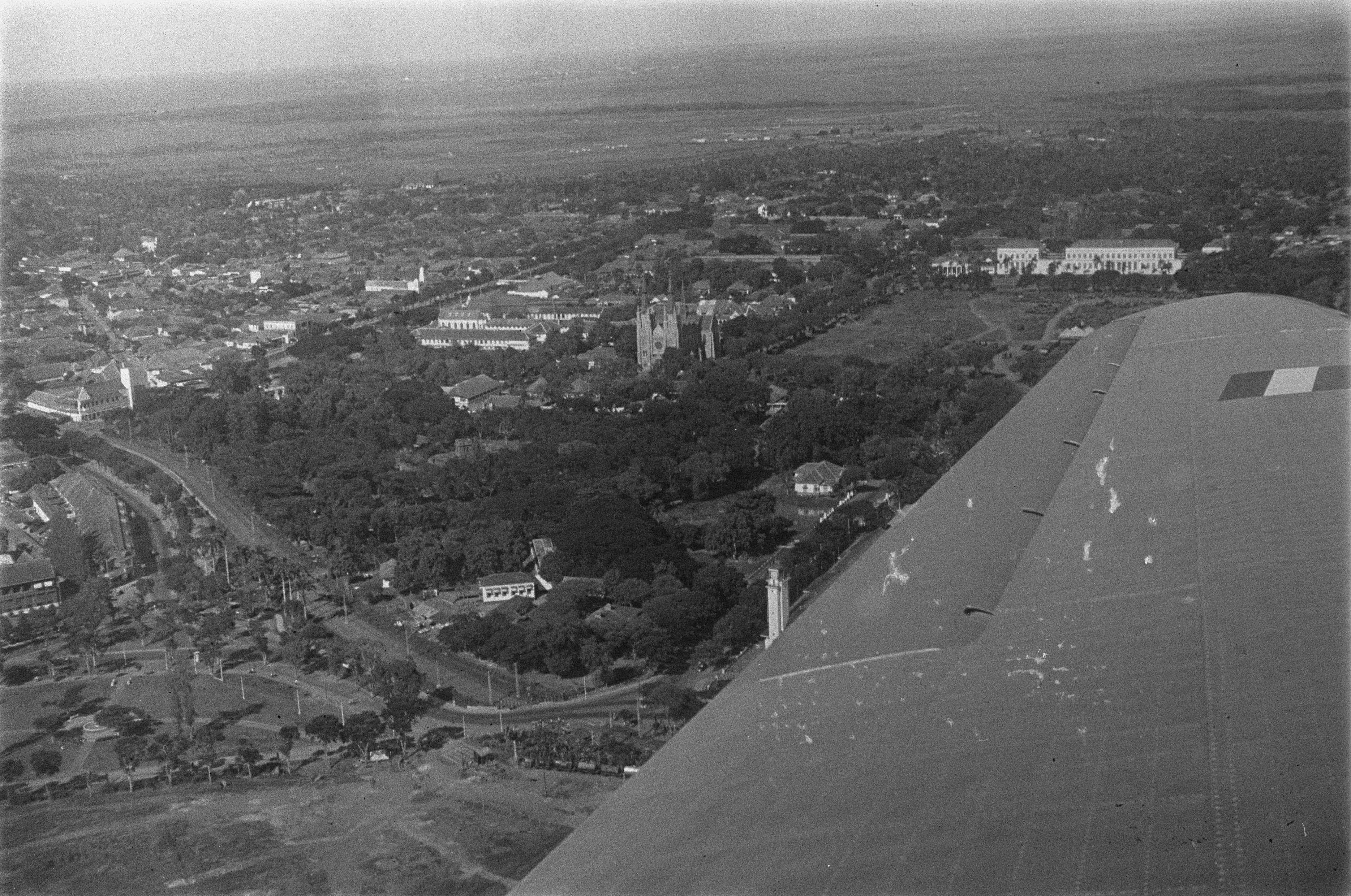 Collectie / Archief : Fotocollectie Dienst voor Legercontacten Indonesië Reportage / Serie : [DLC] Bezoek van prof. Carl Romme aan Semarang Beschrijving : Luchtfoto lBatavia, in het midden de O.L.V. Kathedraal aan het Waterlooplein ) Datum : 16 januari 1946 Locatie : Batavia, Indonesië, Jakarta, Java, Nederlands-Indië Fotograaf : Fotograaf Onbekend / DLC Auteursrechthebbende : Nationaal Archief Materiaalsoort : Negatief (zwart/wit) Nummer archiefinventaris : bekijk toegang 2.24.04.03 Bestanddeelnummer : 127-6-6